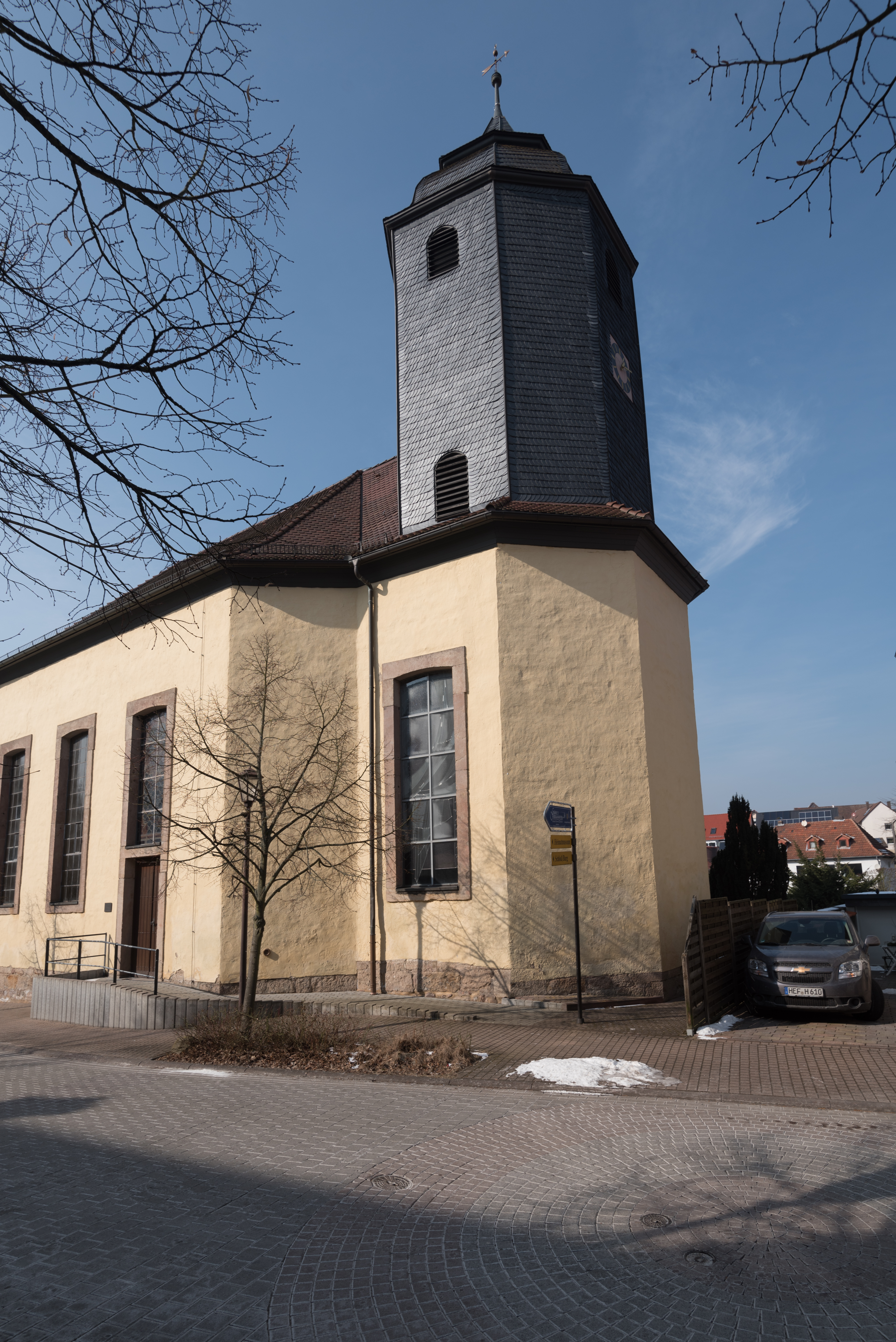 Friedewald, Motzfelder Straße 7